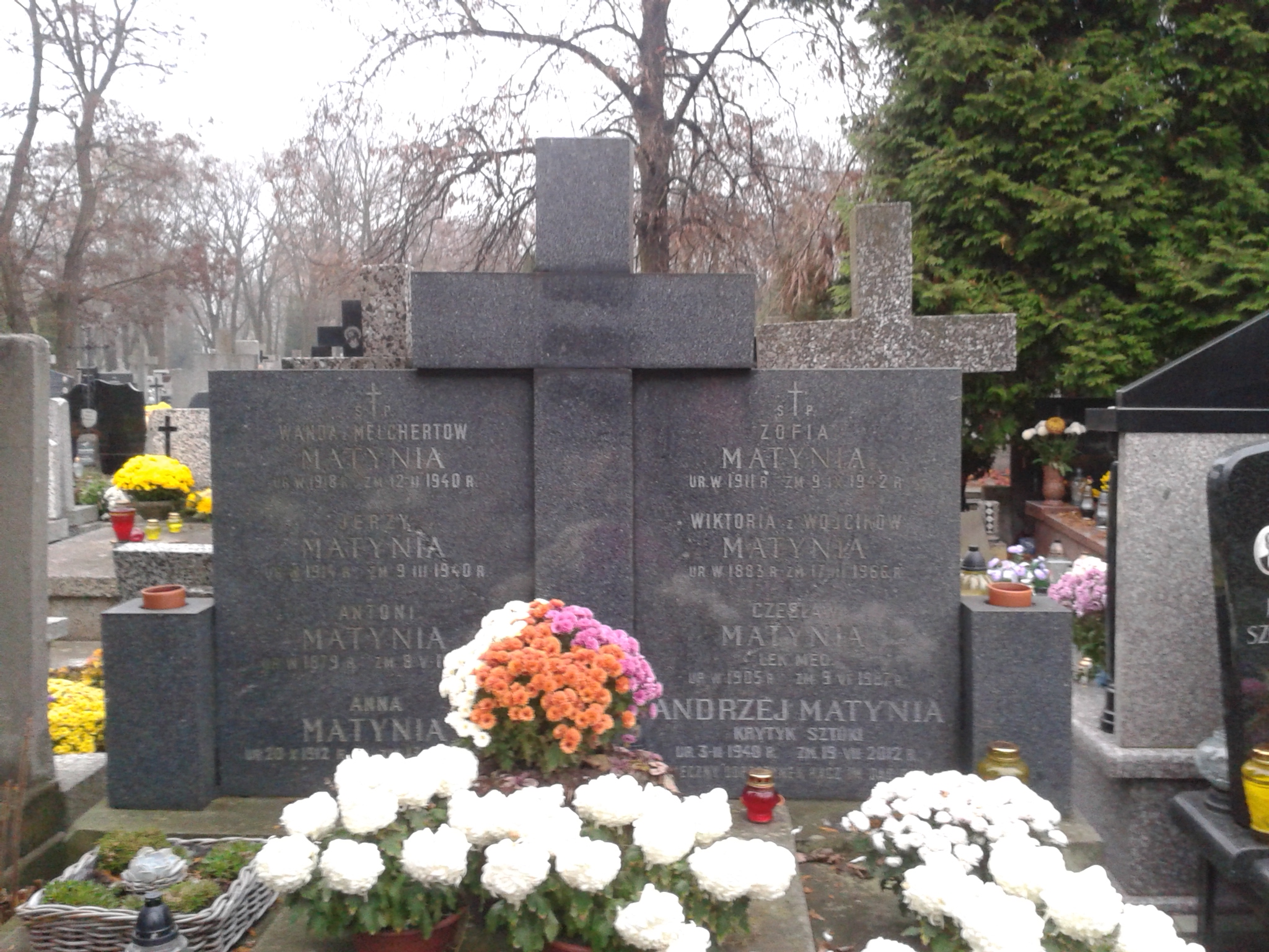 Grób rodzinny Andrzeja Matyni